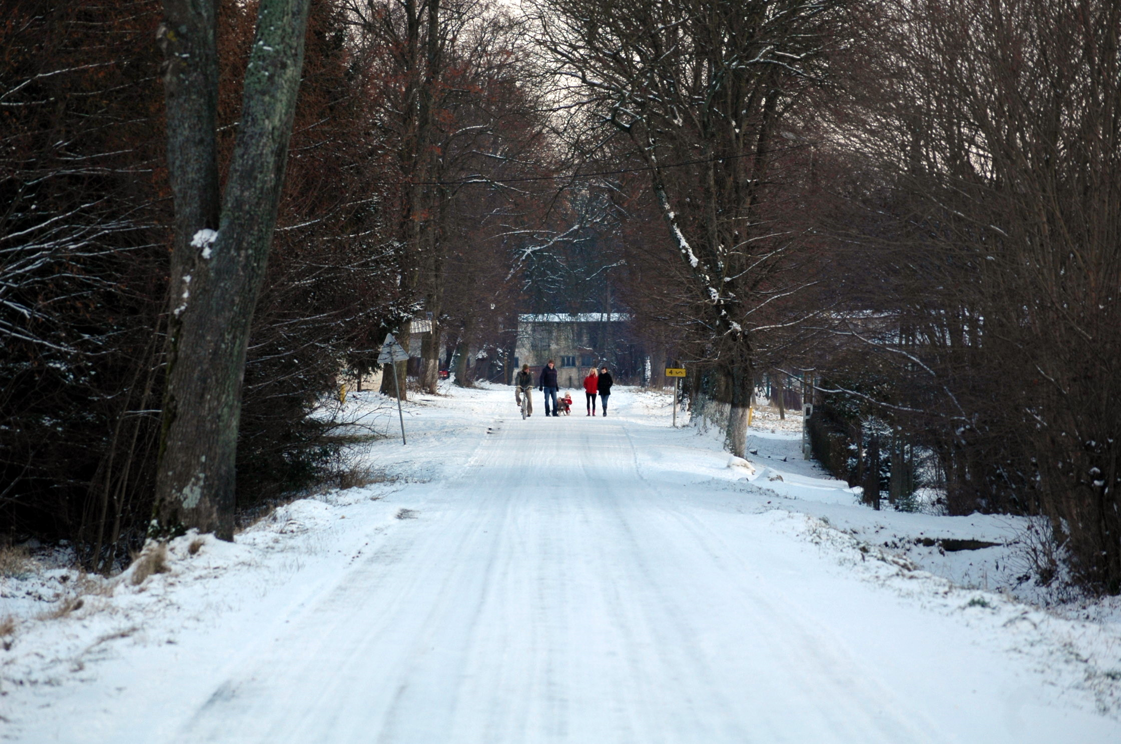 Zima w Gąskowie